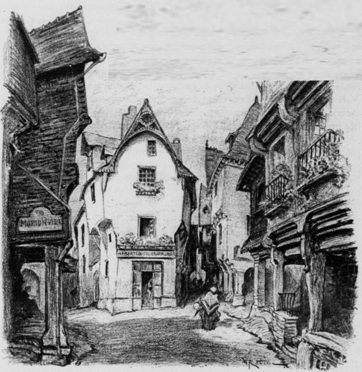 Vitré : rue Poterie (lithographie d'Albert Robida publiée dans "La vieille France" vers 1900)